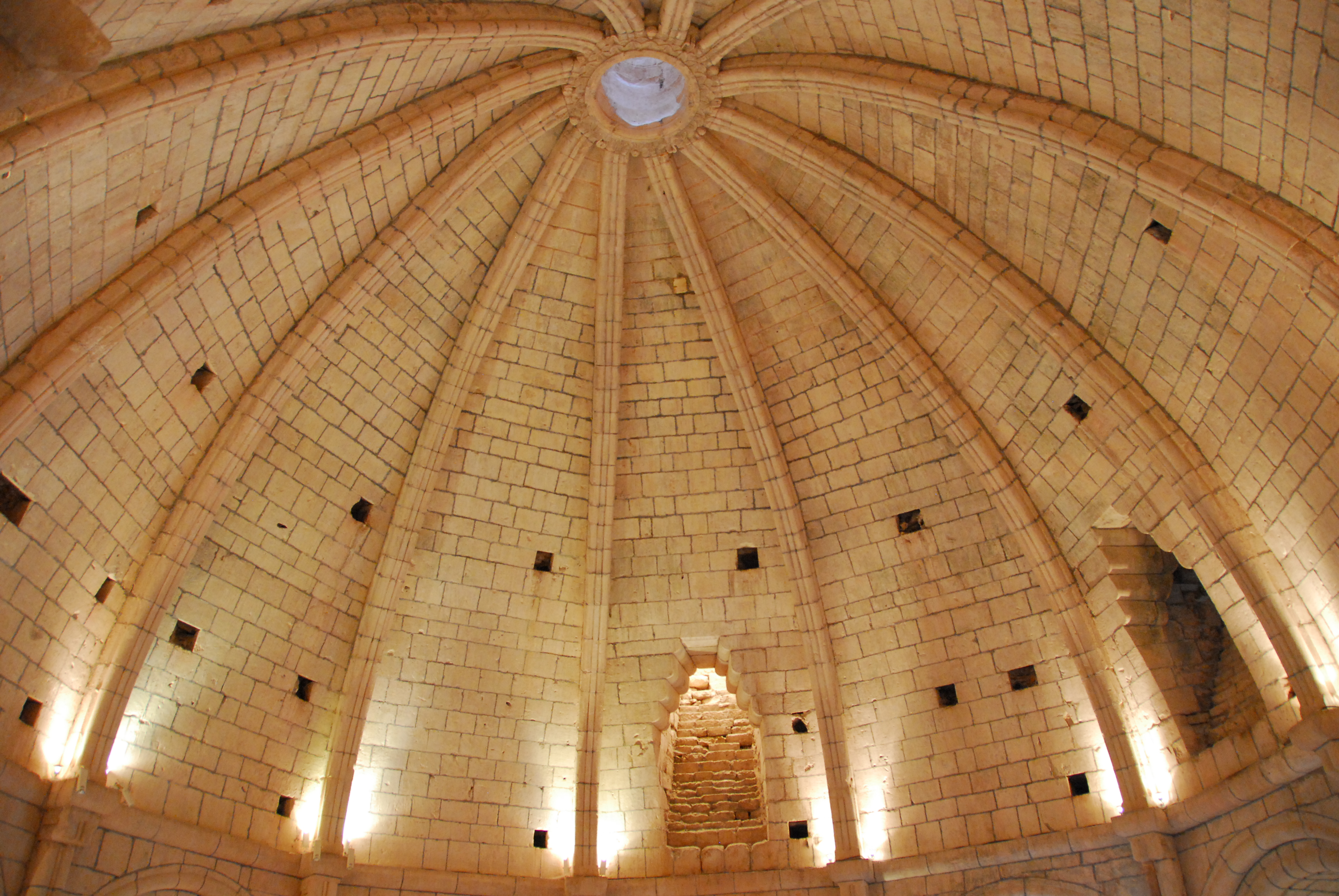 Chateau de Simiane-la-Rotonde, Gewölbesegmente